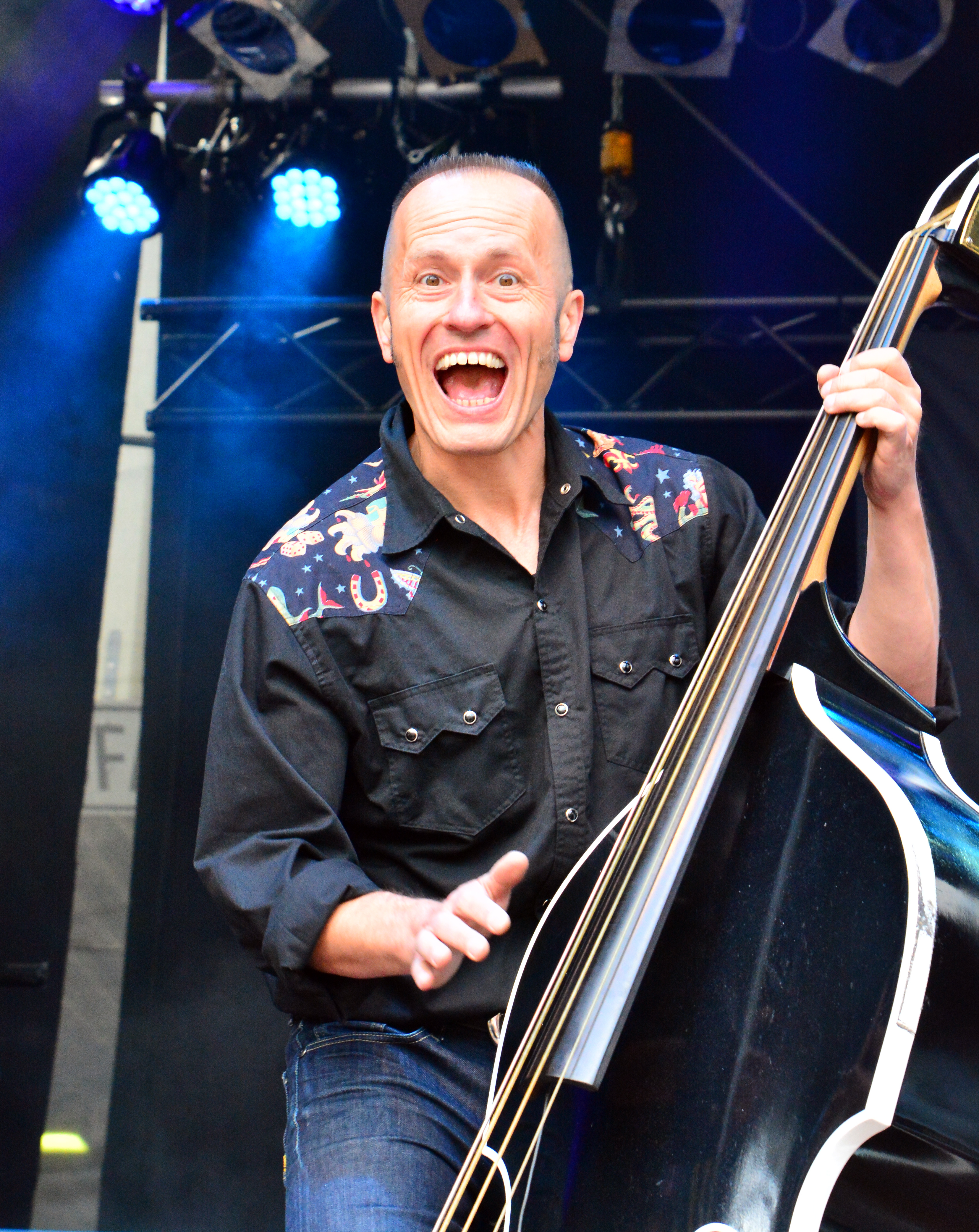 Boppin’B beim „Holsten Brauereifest 2015“ in Hamburg